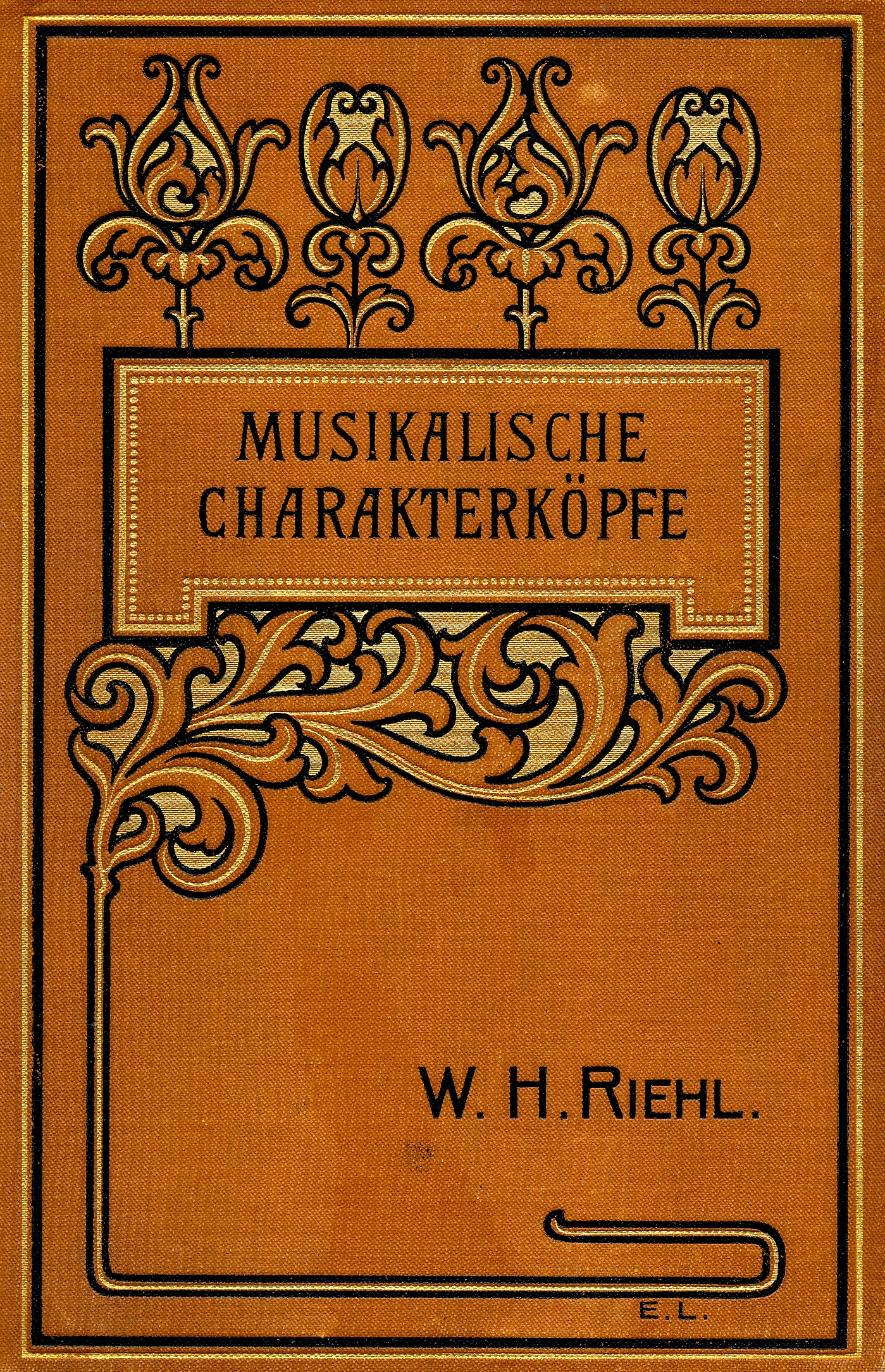 Wilhelm Heinrich Riehl: Musikalische Charakterköpfe, siebente Auflage, Stuttgart 1899 (Leineneinband mit Jugendstil-Motiven)